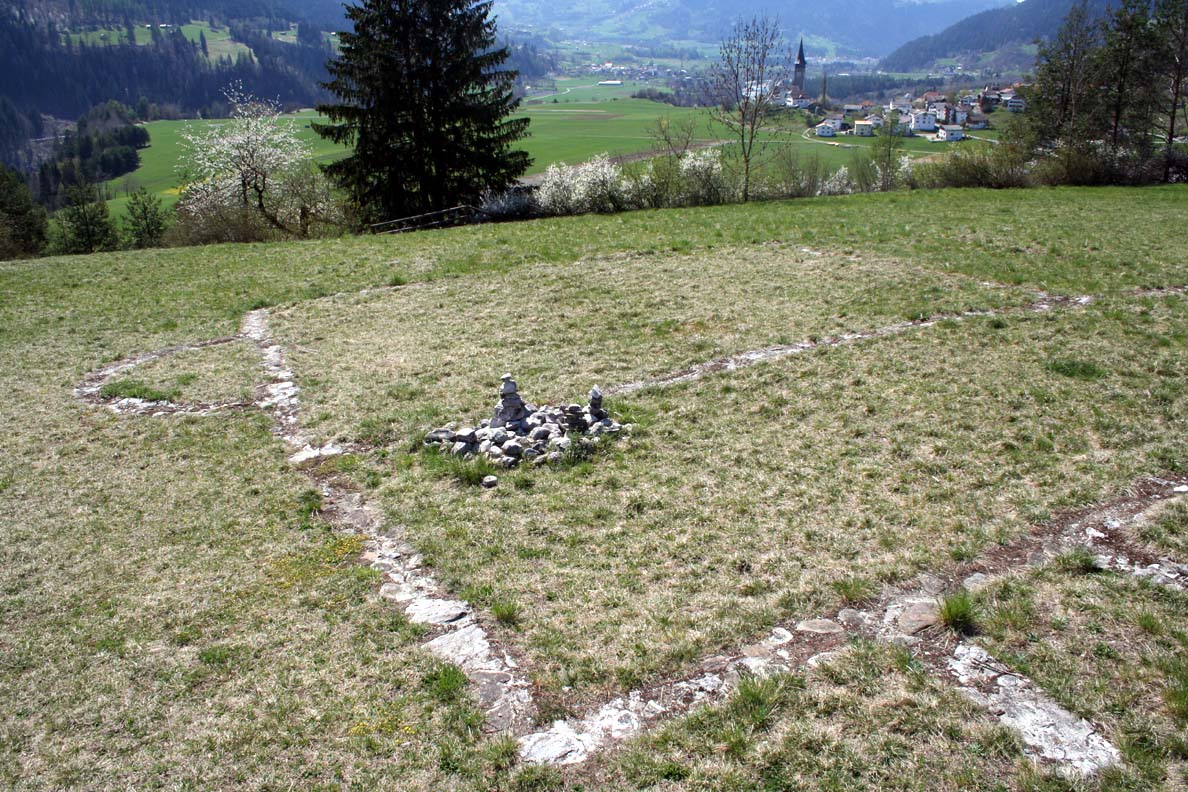 Mauerreste auf Bregl da Haida